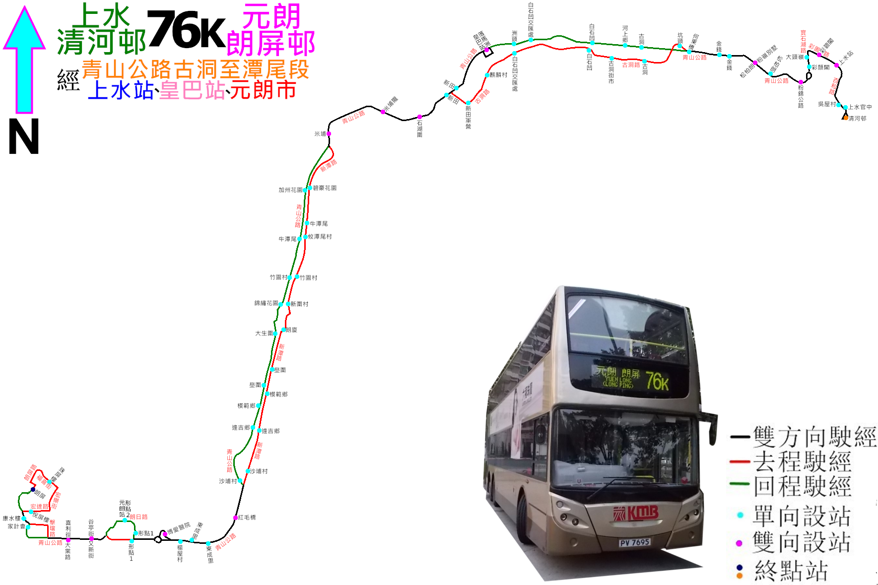 中文（香港）: 九巴76K線的走線圖